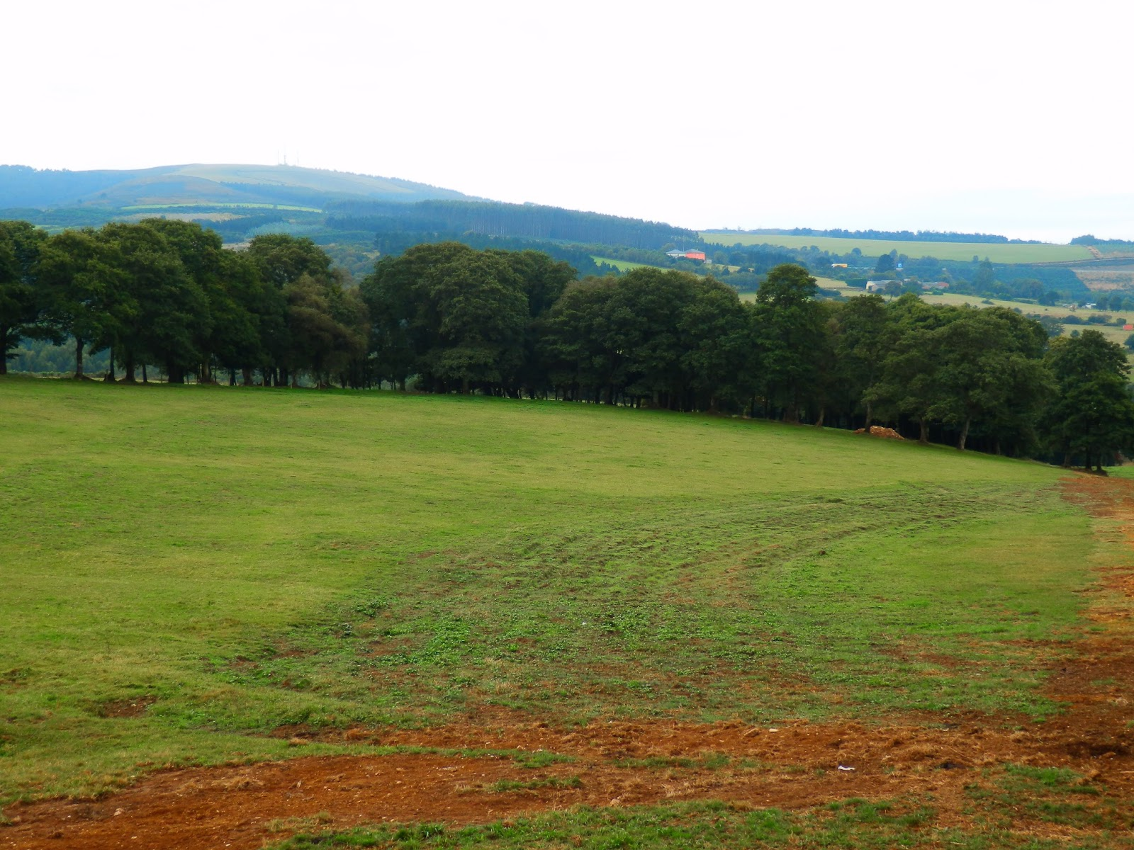 Leiras en O Campo, Abeledo, Abadín.